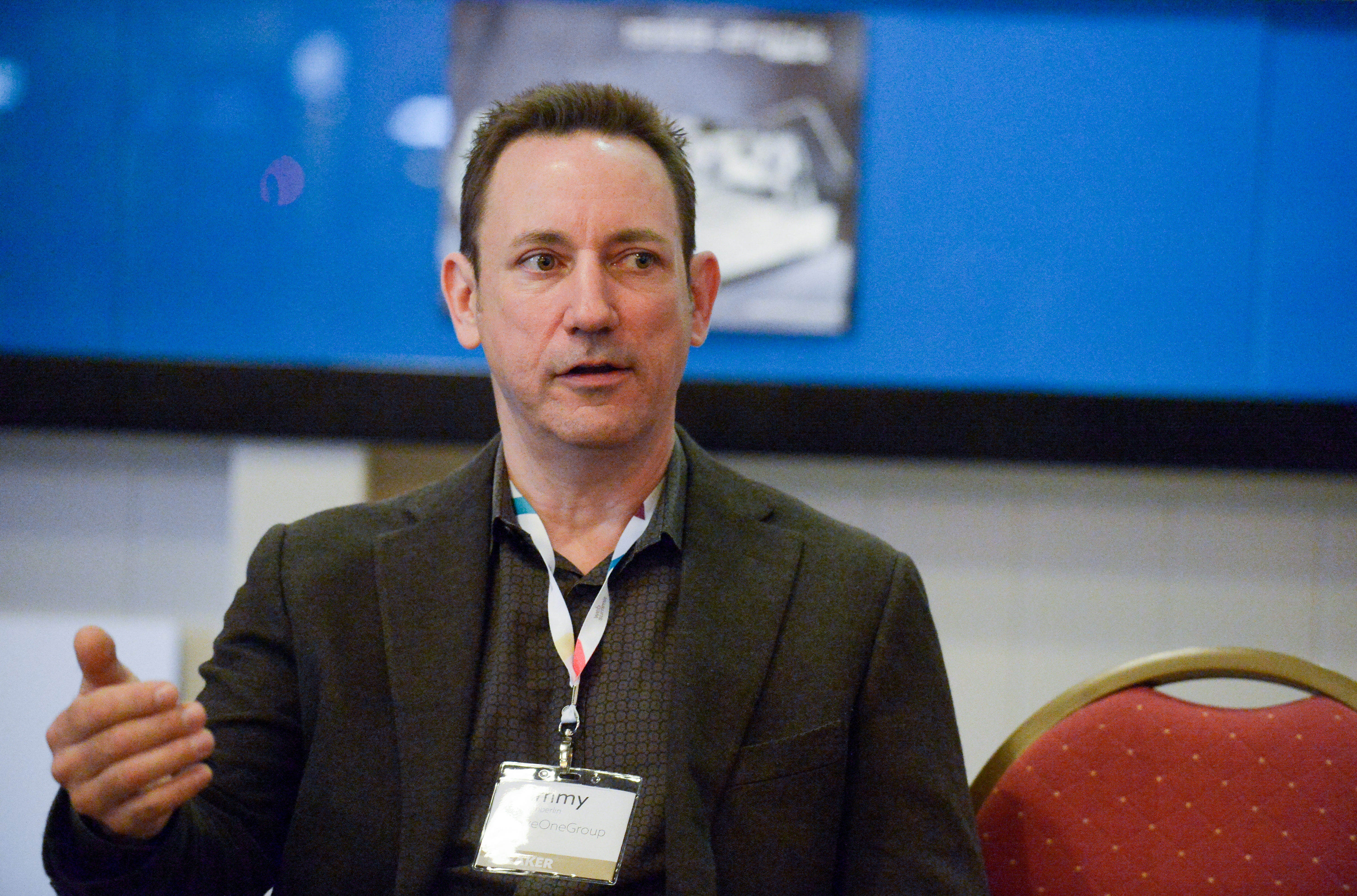 Sportsfile (Web Summit)